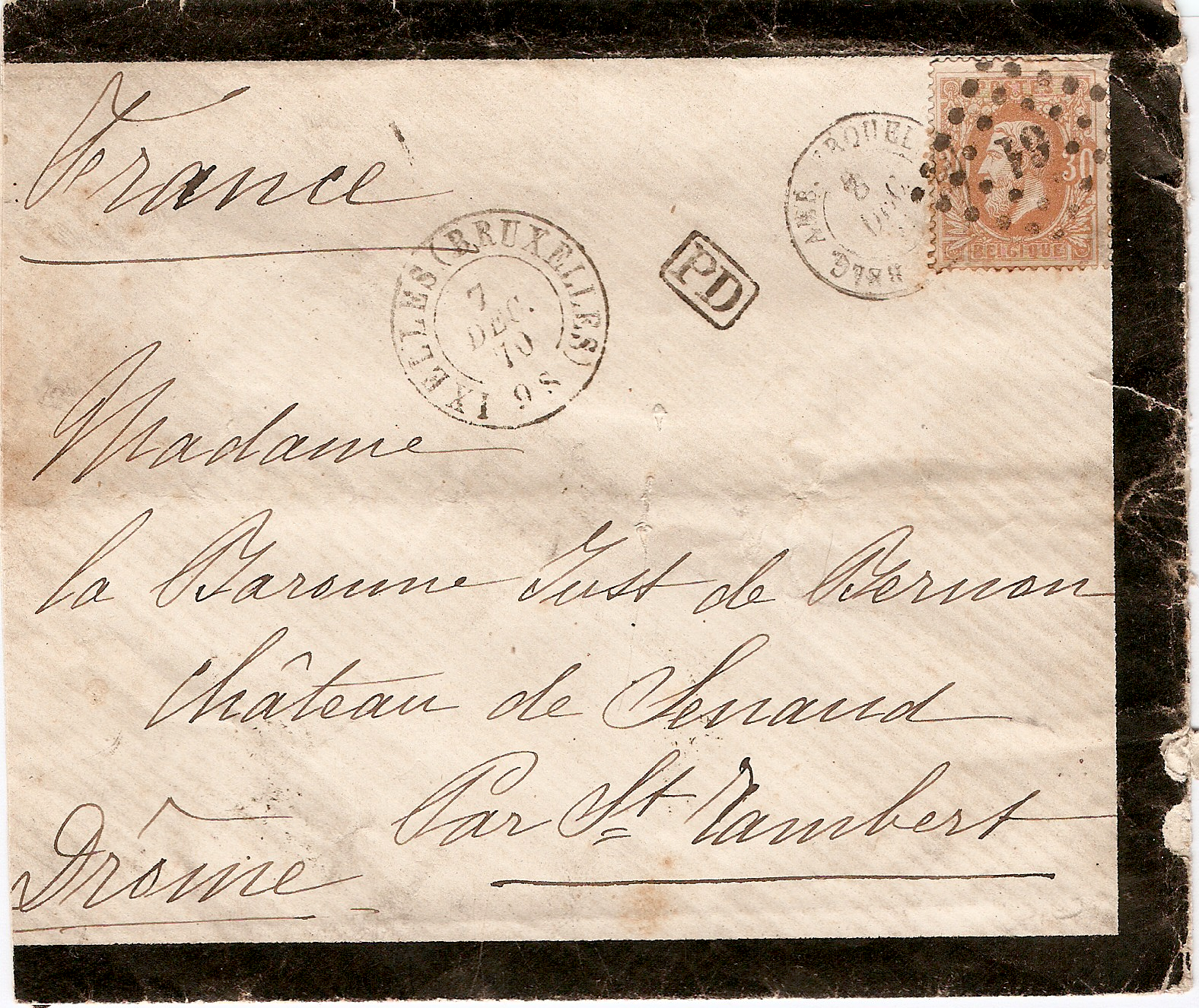 Lettre Belgique Ixelles de 1870, affranchie avec un 30 centimes ambre Léopold II émis le 1/3/1870 et oblitérée par le losange de points 61 de Bruxelles Est (Ixelles).